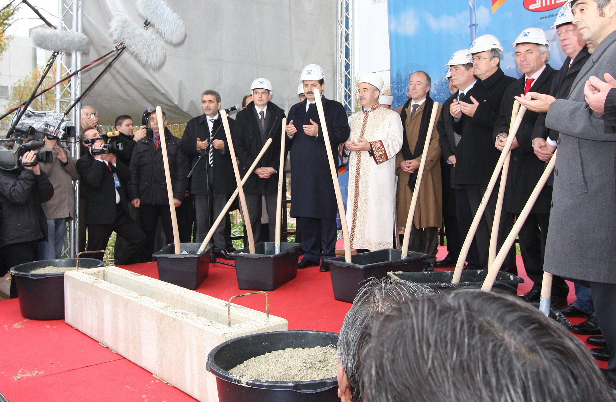 Symbolische Grundsteinlegung der Ditib-Zentralmoschee in Köln-Ehrenfeld. Personen v.l.n.r.: N.N. Thomas Kufen, Integrationsbeauftragter der Landesregierung von Nordrhein-Westfalen. Faruk Çelik, türkischer Staatsminister Ali Bardakoğlu, Präsident des Amtes für religiöse Angelegenheiten (Diyanet) in der Türkei Paul Böhm, verantwortlicher Architekt Fritz Schramma, Alt-Oberbürgermeister der Stadt Köln N.N. Jürgen Roters, Oberbürgermeister der Stadt Köln Josef Wirges, Bezirksbürgermeister Köln-Ehrenfeld N.N.